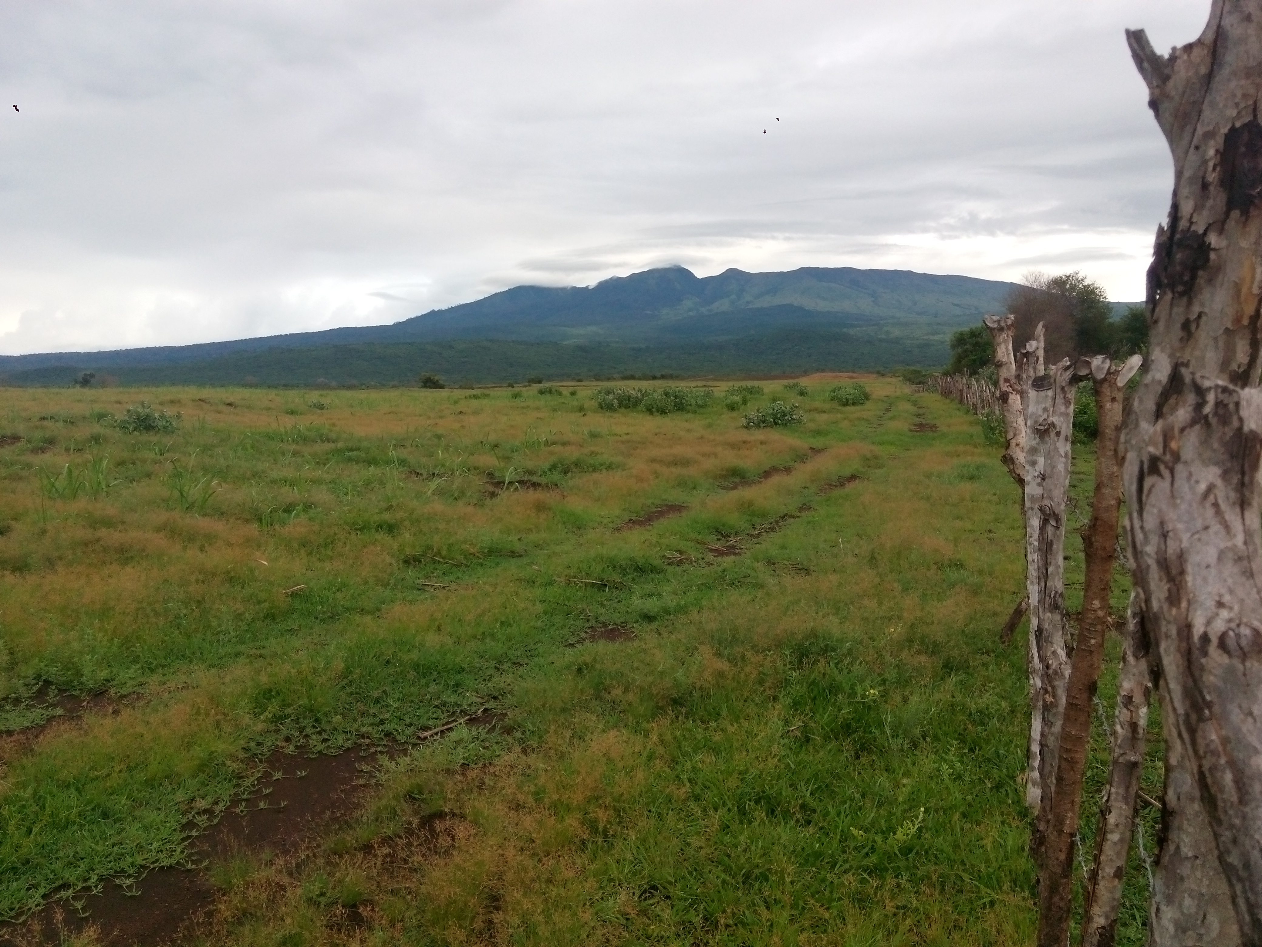 Salah satu jalur masuk Taman Nasional Gunung Tambora dari wilayah Doro Ncanga, Kec. Pekat, Kab. Dompu, Prov. Nusa Tenggara Barat.